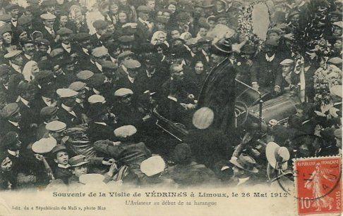 France, Aude (11), Limoux, jules védrines dans la foule